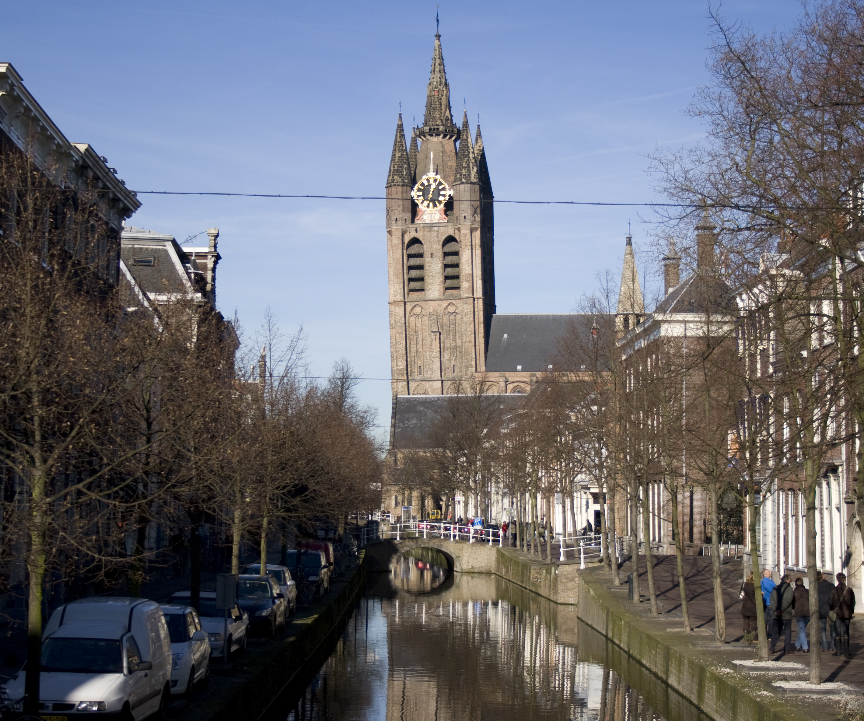 De oude kerk in Delft waarbij het duidelijk zichtbaar is hoe scheef te kerktoren hangt. Genomen op 35mm, F/4.5, ISO100, 1/1000sec.